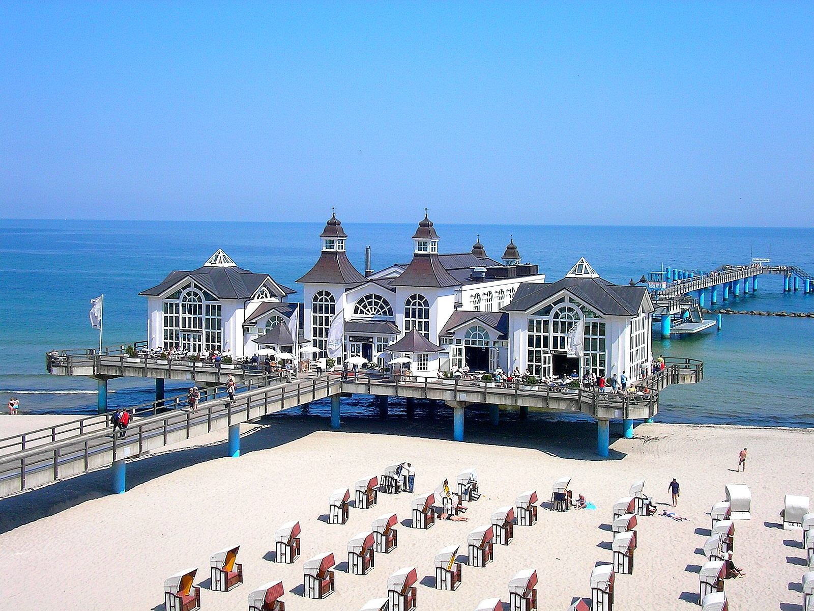 Insel Rügen-Strand von Sellin